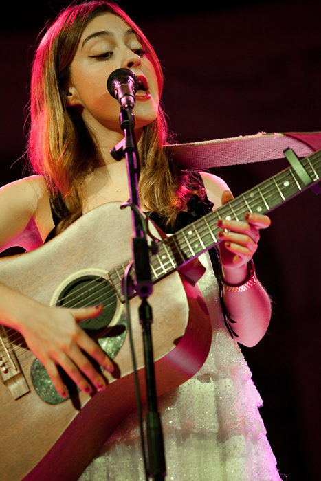 Podéis encontrar más información en nuestra web Alterna2